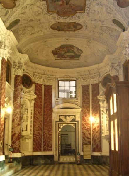 Livorno: il Santuario della Madonna delle Grazie sul colle di Montenero, che deve l'aspetto attuale ad interventi settecenteschi. Nella foto l'atrio che precede l'accesso alla chiesa vera e propria.